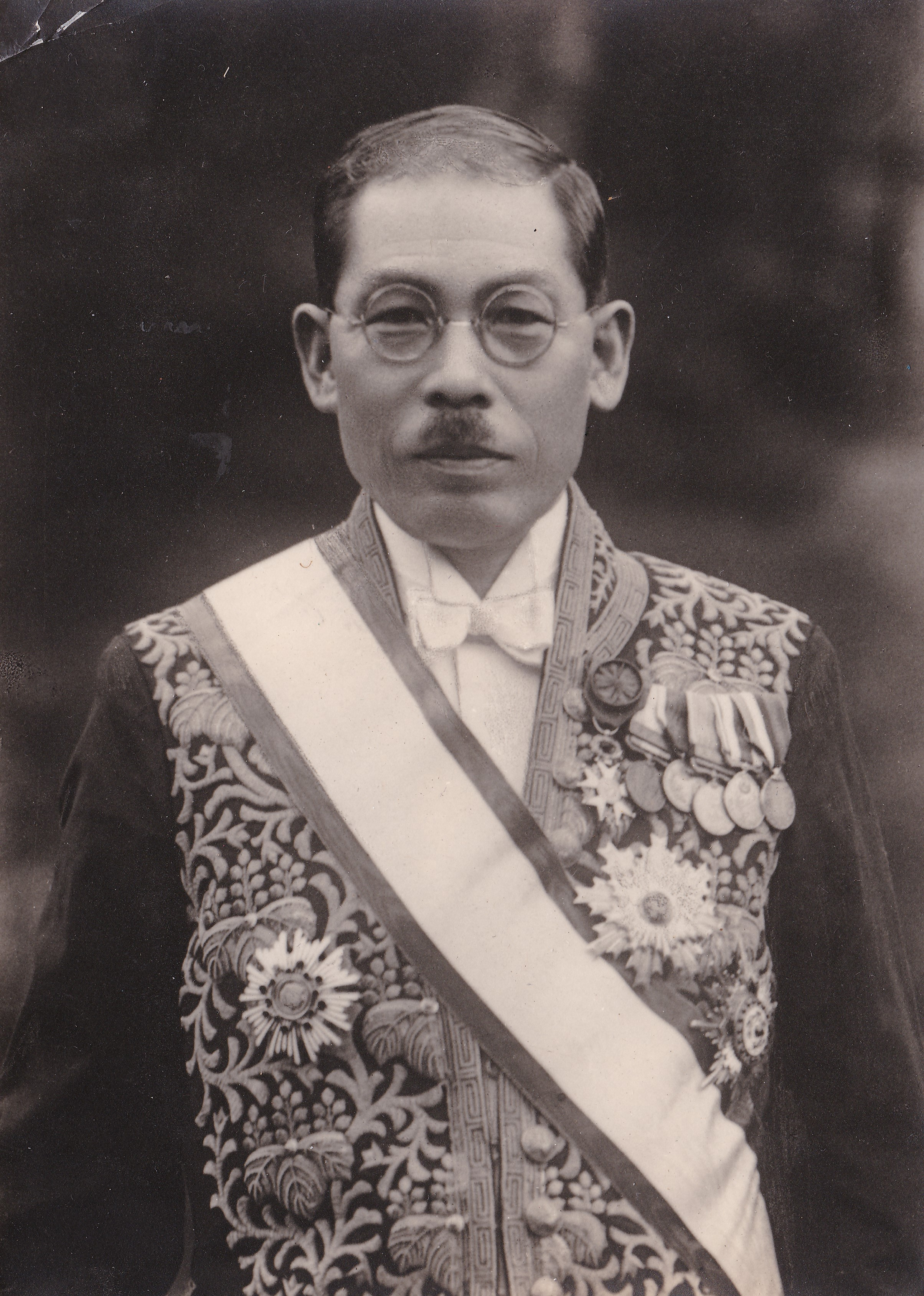 勝田主計（日本の大蔵官僚、政治家、閣僚）の写真